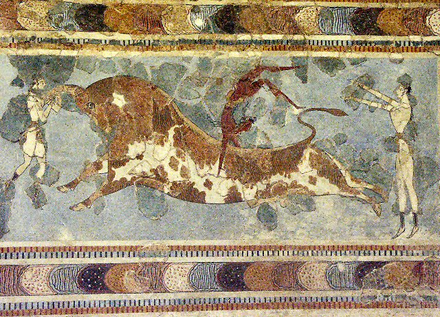 Minoische Wandmalerei mit Stierspringern (Archäologisches Museum, Iraklio, Kreta)